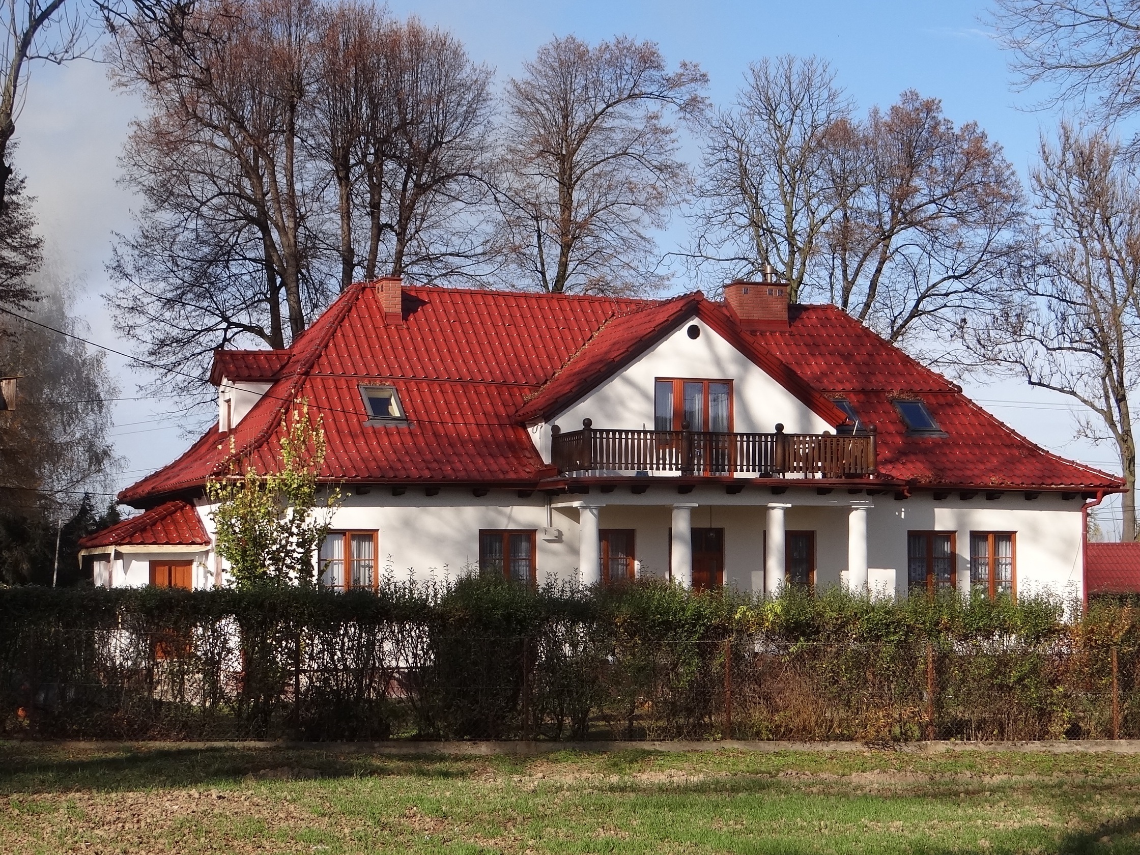 Dawny dworek w Dąbrowicy-Chrostowej